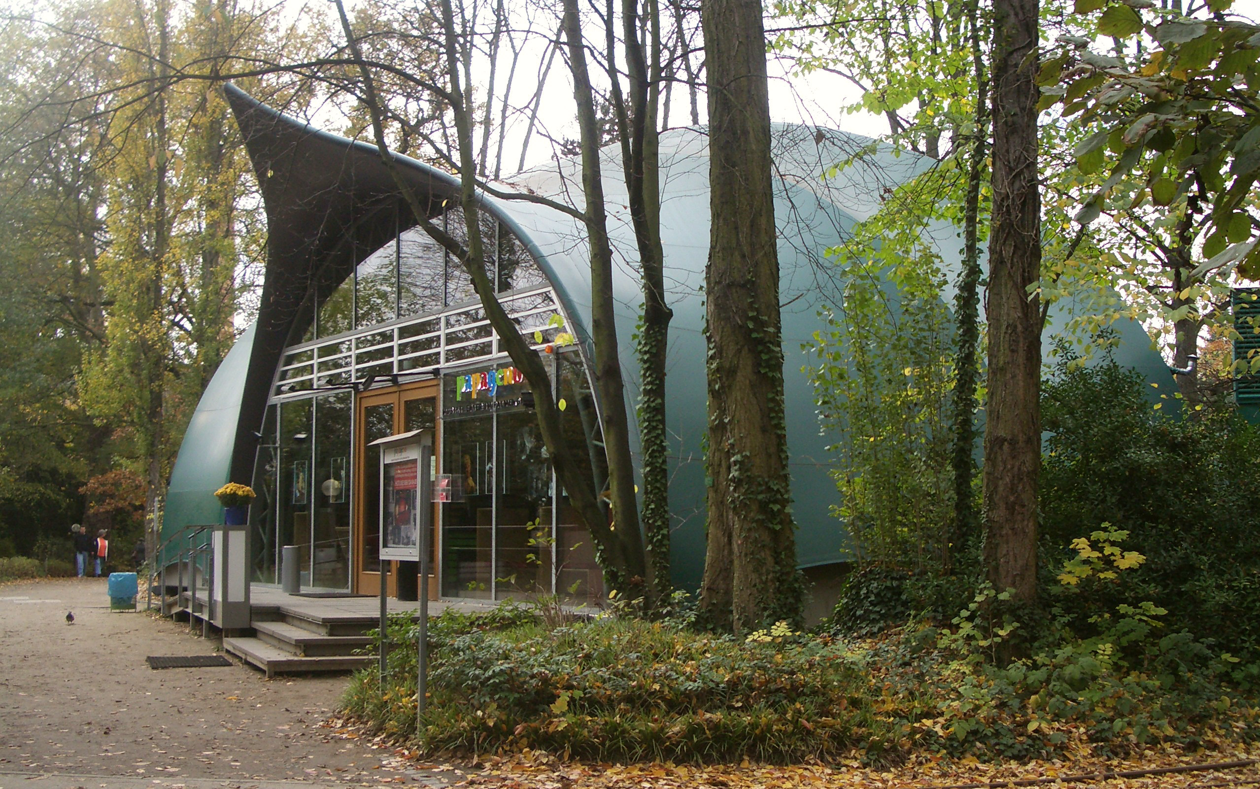 Frankfurt am Main, Germany: Musiktheater Papageno im Palmengarten